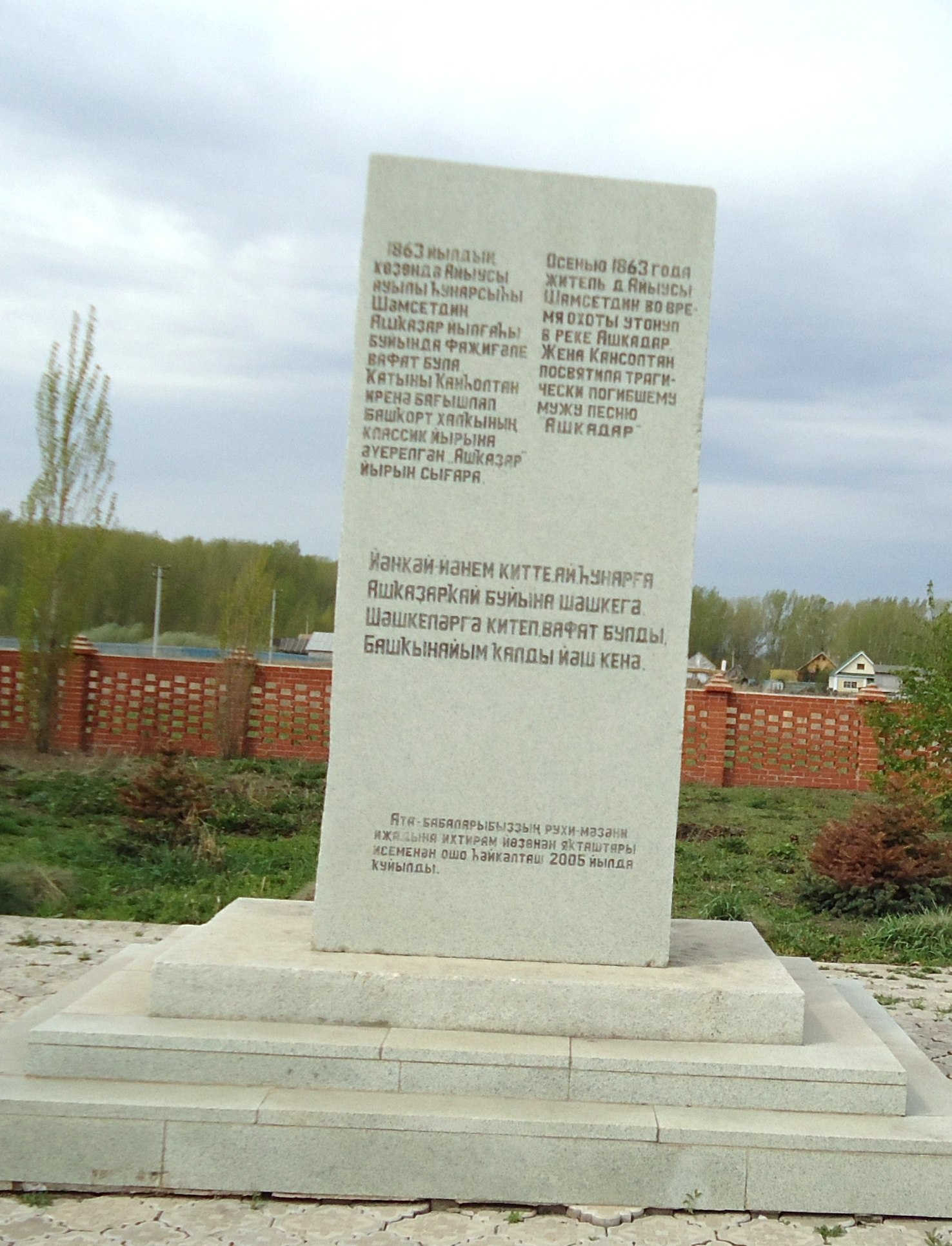 Стәрлетамаҡ районы Айыусы ауылында "Ашҡаҙар" йырына ҡуйылған һәйкәо